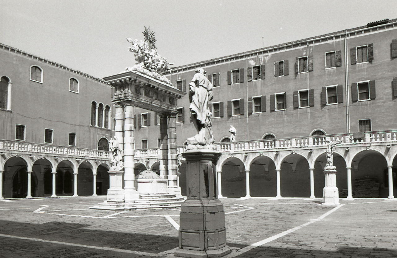 Servizio fotografico : Venezia, 1981 / Paolo Monti. - Strisce: 7, Fotogrammi complessivi: 37 : Negativo b/n, gelatina bromuro d'argento/ pellicola ; 35 mm. - ((Sul portanegativi: N[I]K[MA]T Tri-X. - Occasione: Seminario di fotografia a Palazzo Fortuny e Documentazione per la pubblicazione: Crivellari Domenico (a cura di), Venezia, Milano, Electa, 1982. - Fonte: Agenda di Paolo Monti: Nikon Leika 3001-/ Monti 1978 (1978-1982), presso Archivio Paolo Monti. - Fonte: Monografia di Crivellari Domenico (a cura di): Venezia, Milano, Electa (1982)